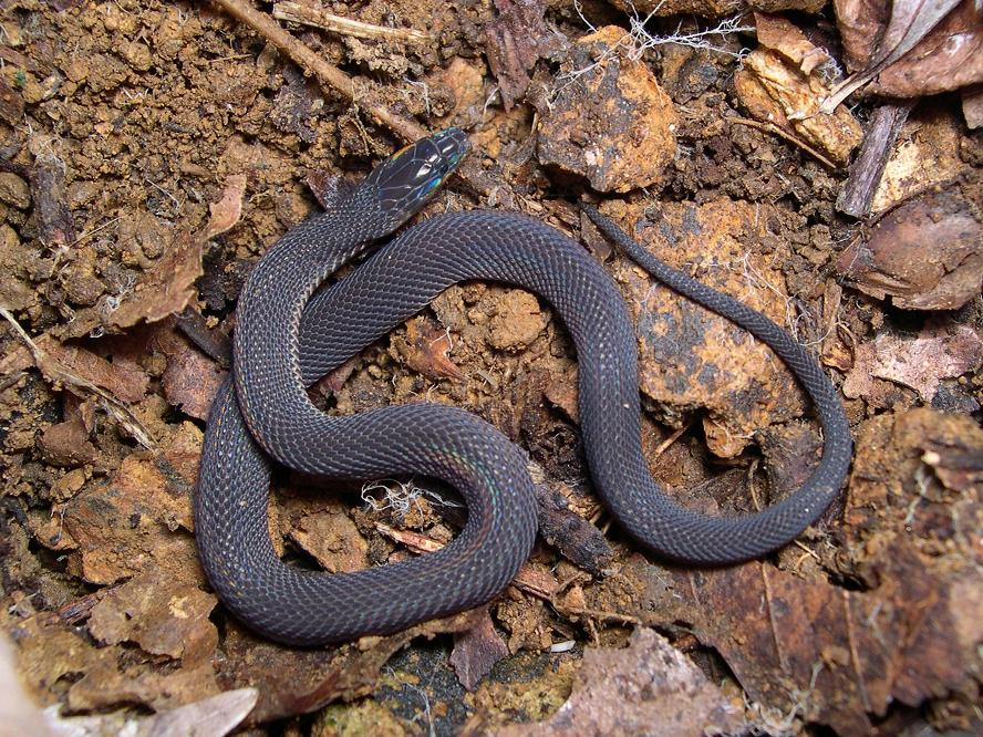 Juvenile Japanese Odd-scaled Snake, Achalinus spinalis W. Peters, 1869 (Squamata: Serpentes: Colubridae). Total length: aprx 12cm. Loc: Hamamatsu, Shizuoka Prefecture, Japan. ja: タカチホヘビ （ナミヘビ科：タカチホヘビ属）。全長約 12cm の幼蛇。背面。 場所：浜松市